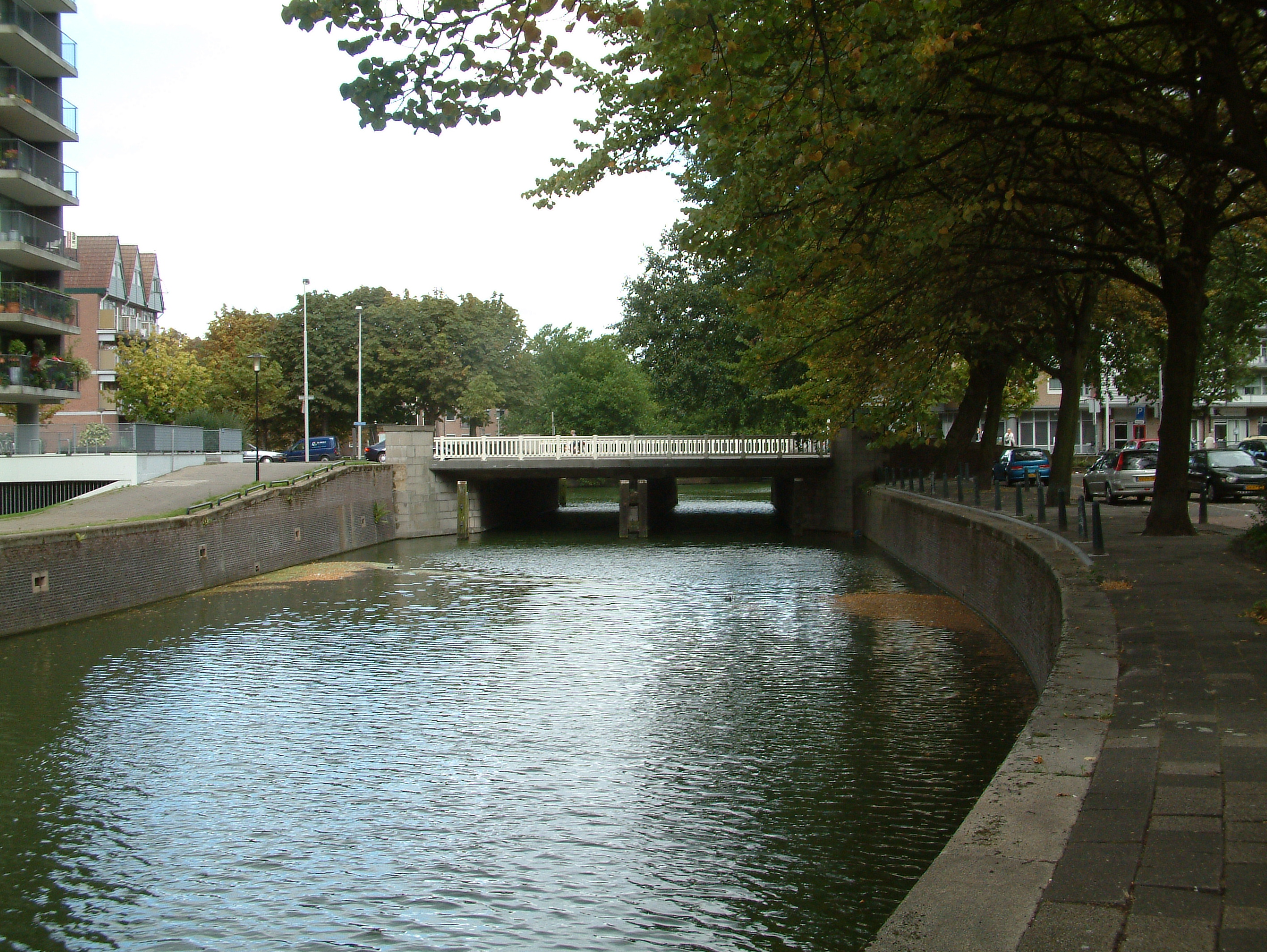 Bruggen over de Rotte, De Admiraal de Ruyterbrug in de Admiraal de Ruyterweg, westkant